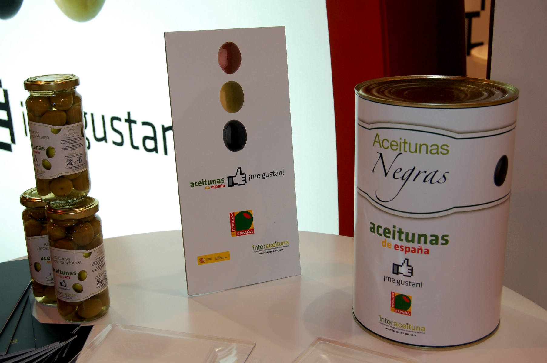 "Aceitunas de España, me gustan." Eslogan de una campaña publicitaria del Gobierno de España e Interaceituna